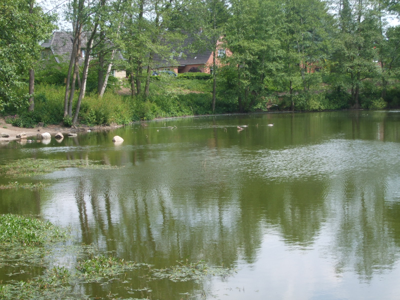 Blick auf die Hauptfundstelle der Opferniederlegungen